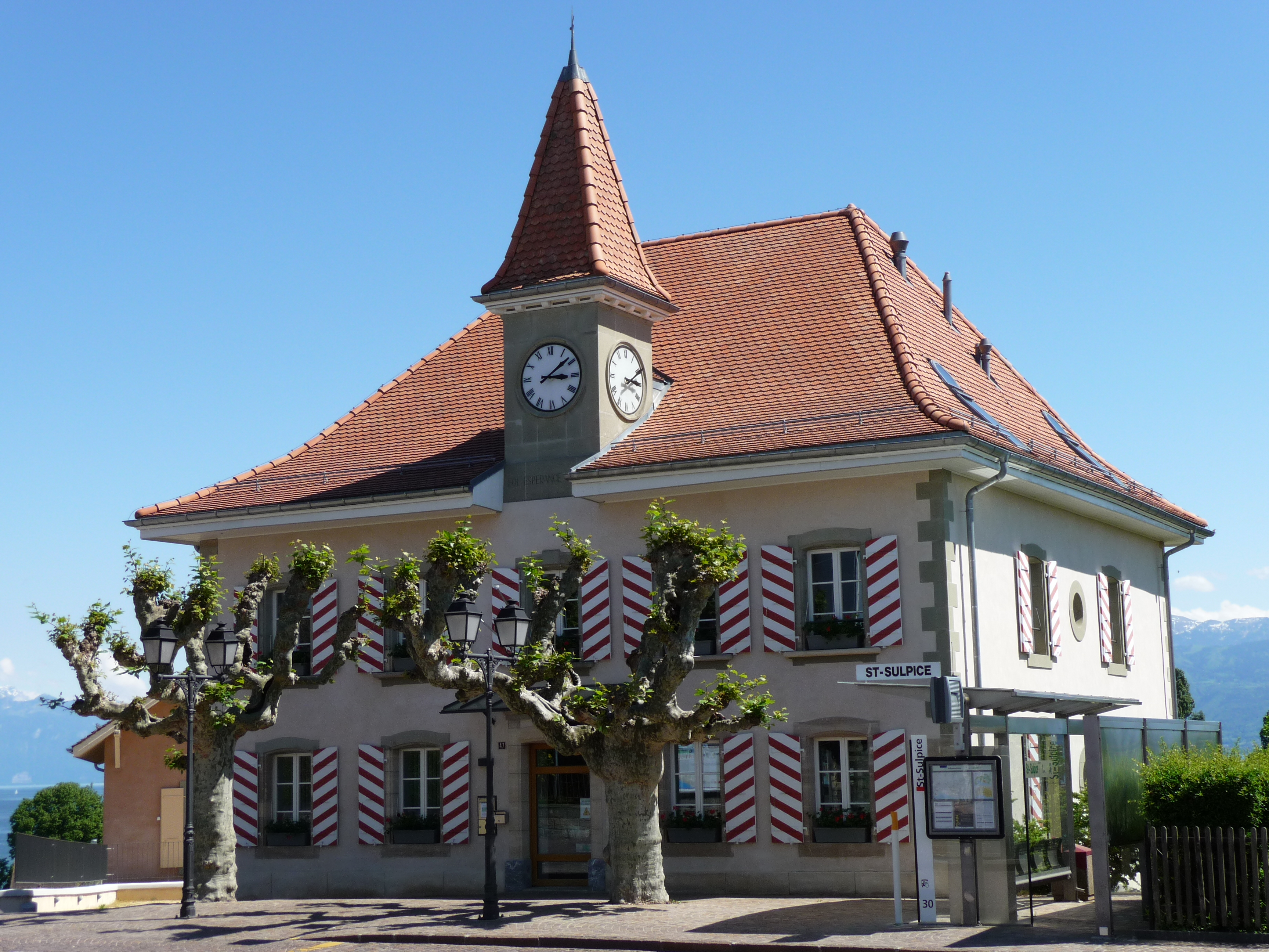 St-Sulpice